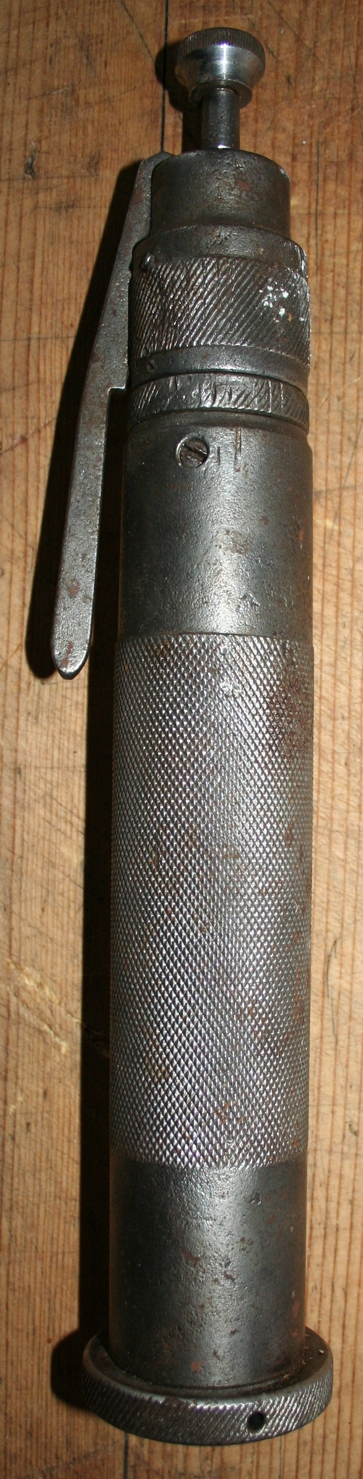 Schlachtschussapparat